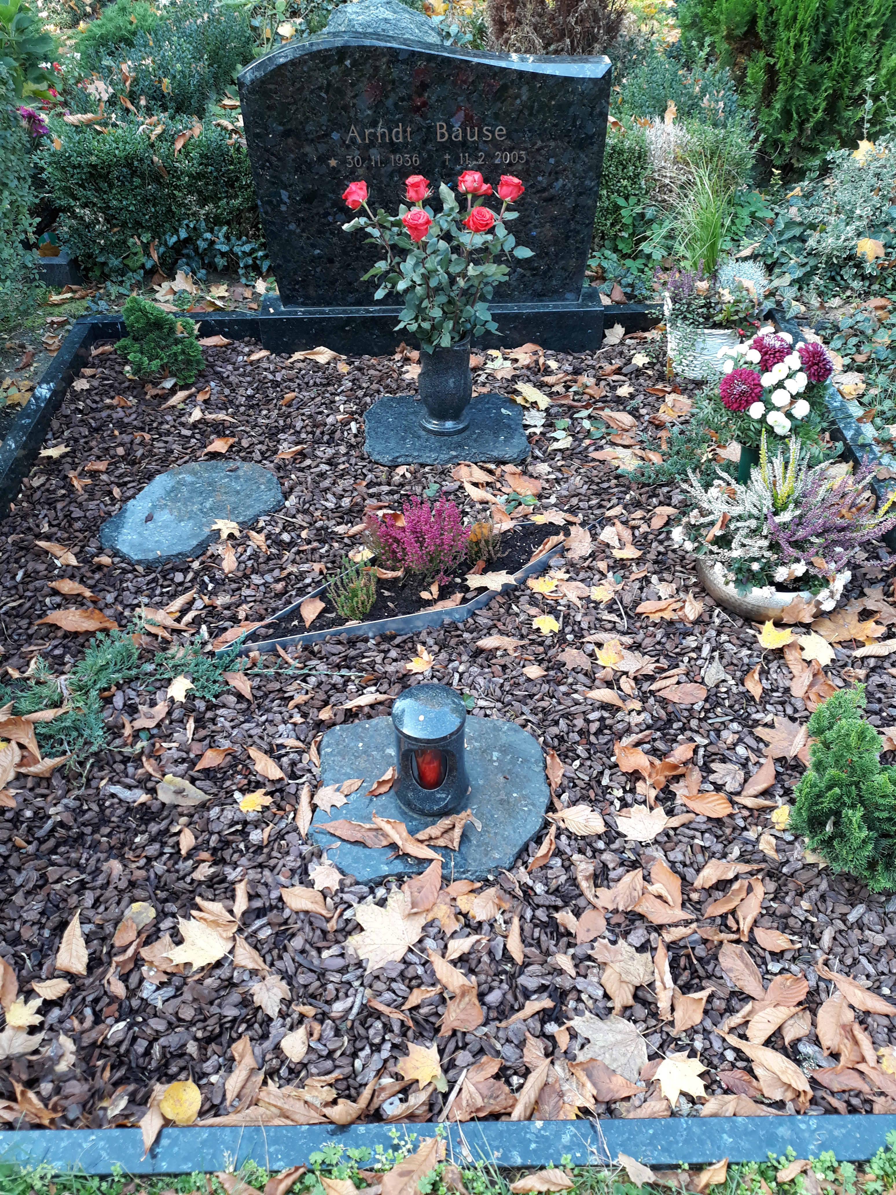 Das Grab des deutschen Komponisten Arndt Bause auf dem Sophien-Friedhof in Berlin.